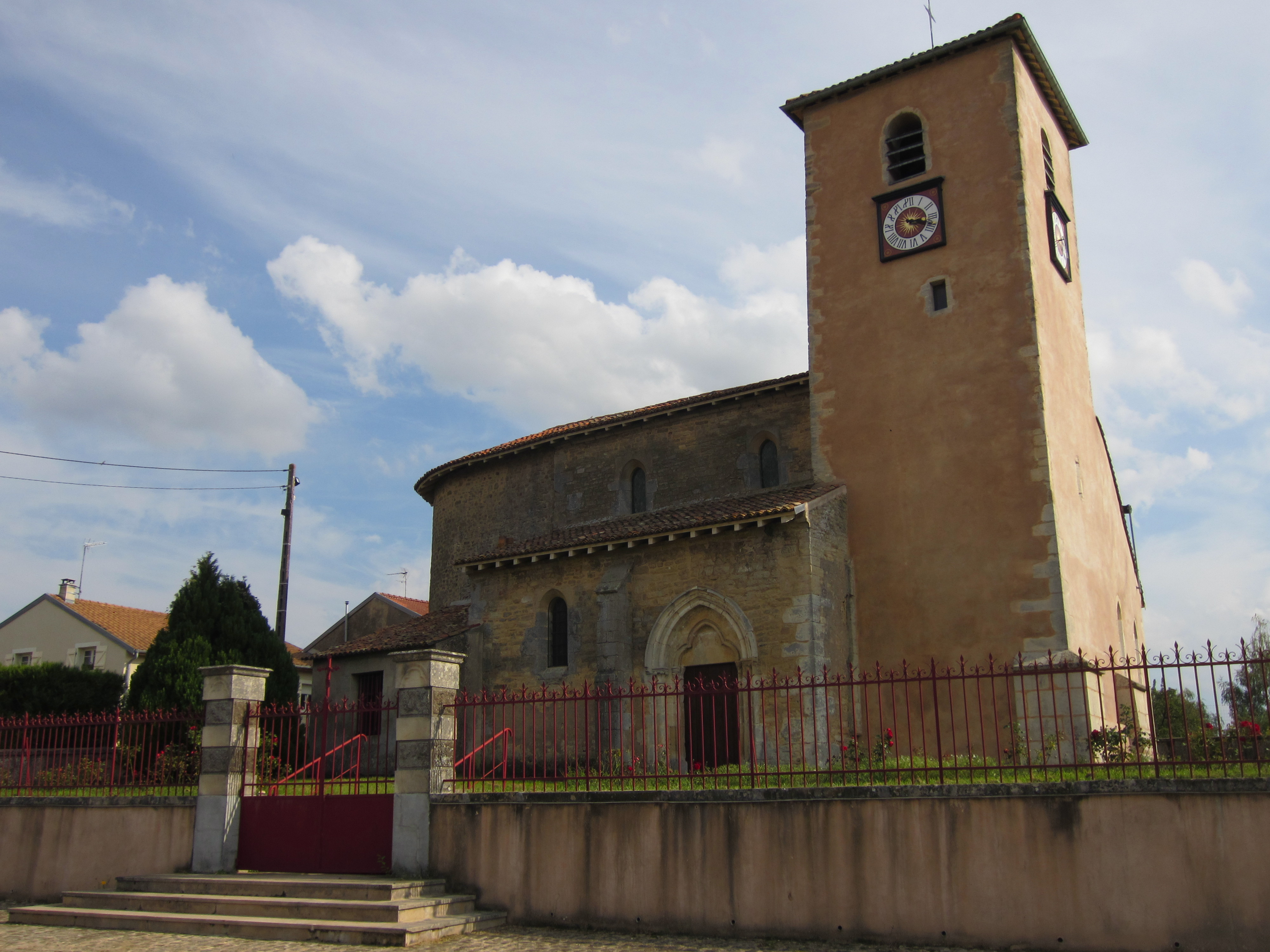 Description L'église Saint-Clément à Xammes L'église Saint-Clément à Xammes